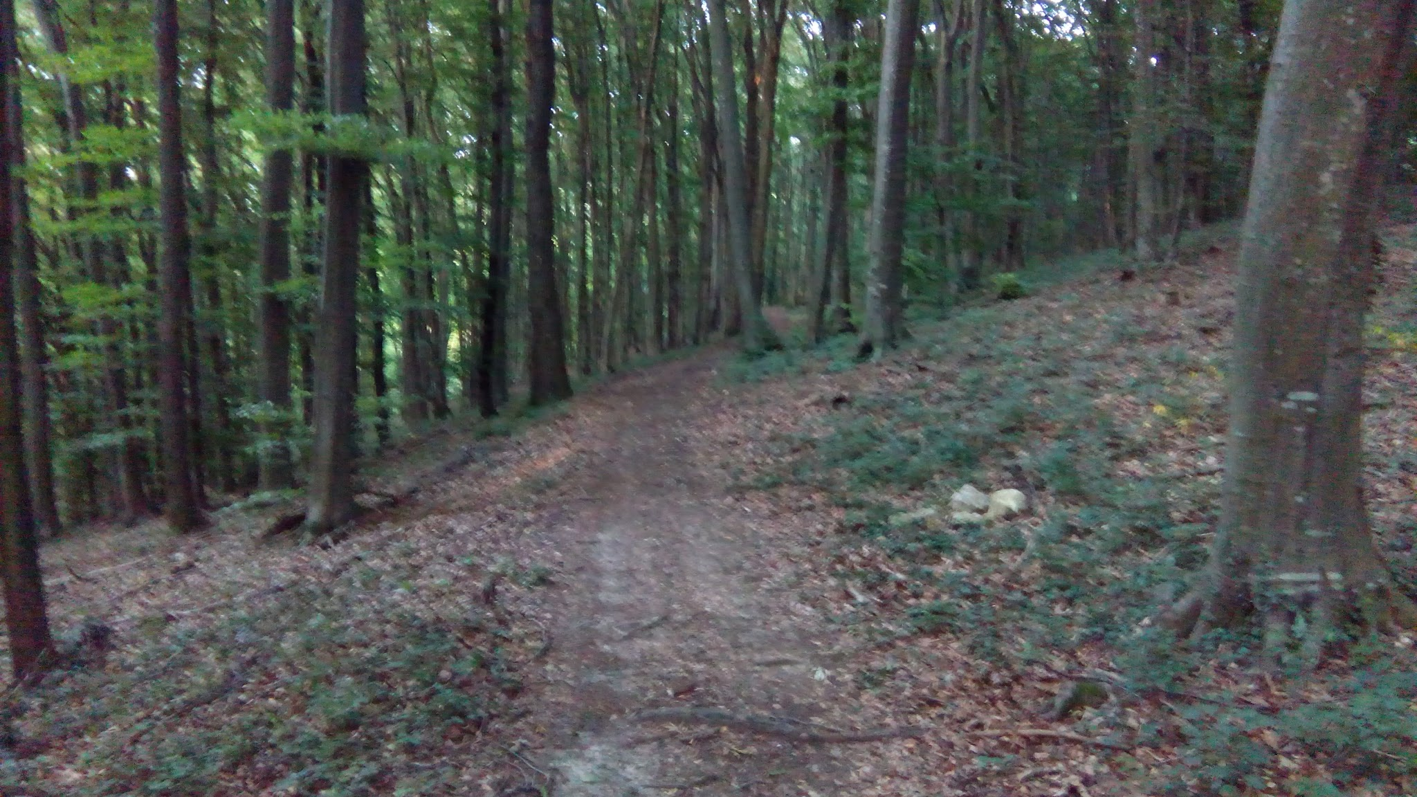 43500, Vrbovac, Croatia